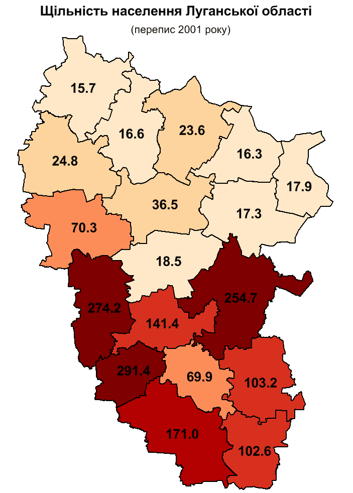 Щільність населення Луганської обл. за переписом 2001 р. / Population density in Luhansk oblast, 2001 census